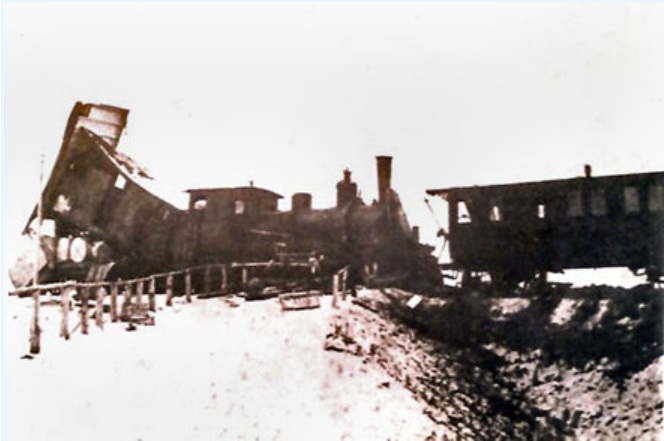 Eisenbahnunfall von Seebach Am 8. Januar 1885 fuhr bei der Nordostbahn (NOB) ein Zug Winterthur–Zürich nach dem Überfahren eines geschlossenen Signals auf einen aus Wettingen kommenden Zug auf. Der Zug aus Wettingen wurde von der Station Seebach rückwärts über die auf offener Strecke liegende Abzweigung geschoben, um nachher vorwärts in Richtung Zürich weiterzufahren. Der Unfall forderte sieben Verletzte und grossen Sachschaden.